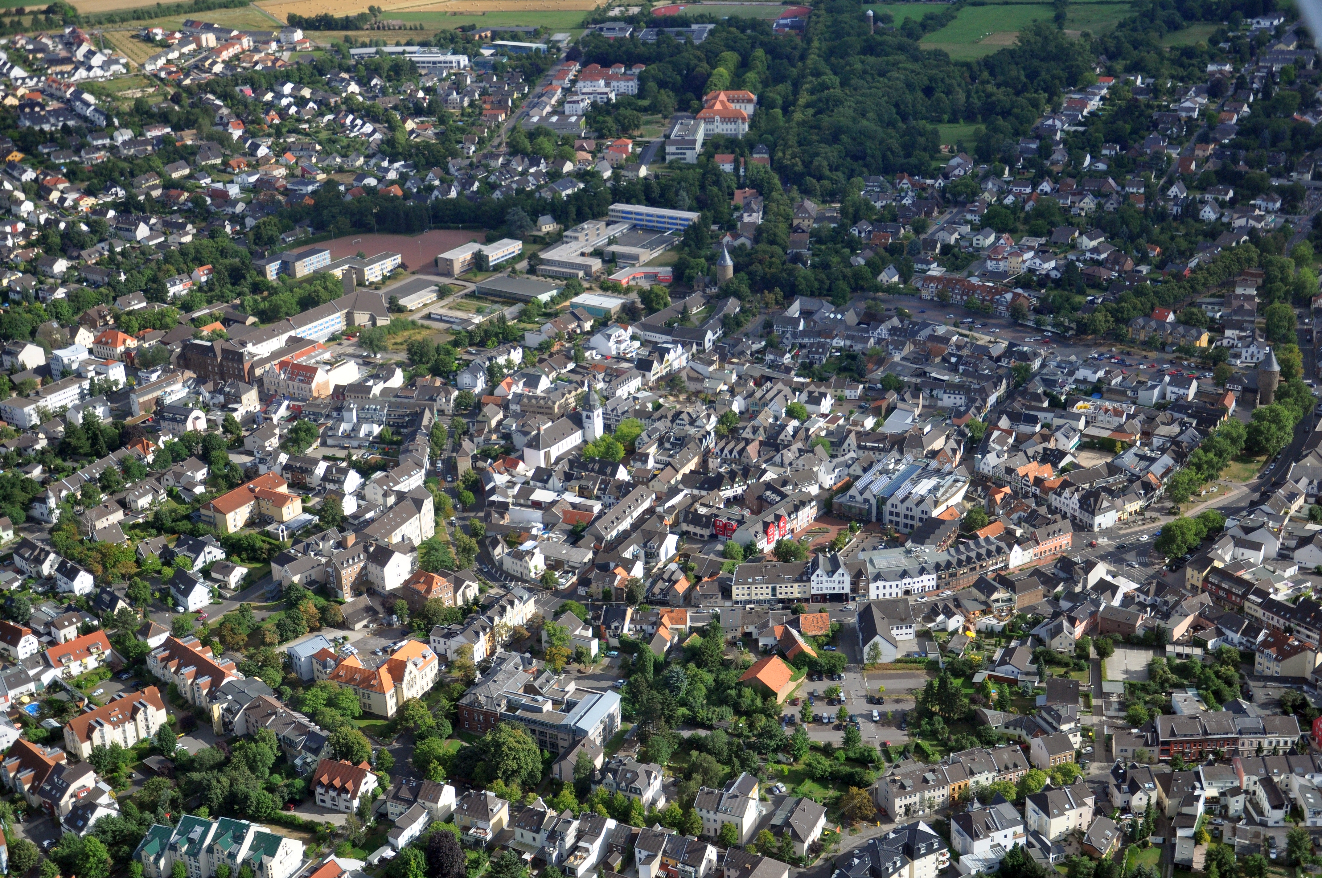 Rheinbach, August 2013. Kernstadt mit Blick aus nordwestlicher Richtung